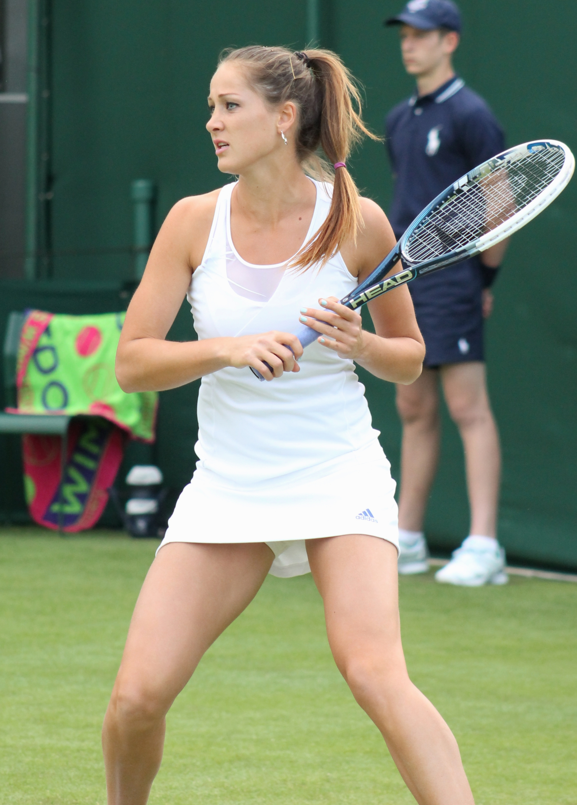 Bojana Jovanovski at 2013 Wimbledon